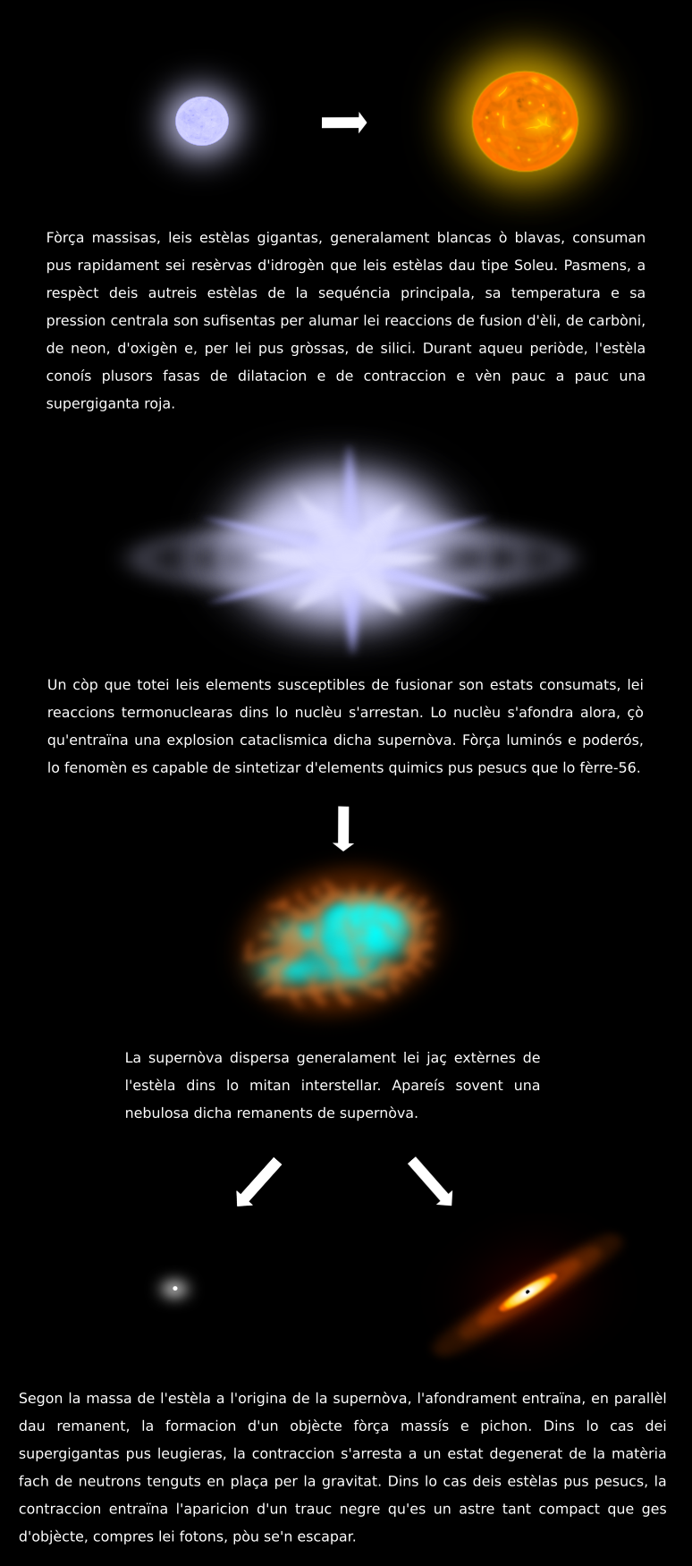 Evolucion deis estèlas supergigantas vèrs la supernòva.